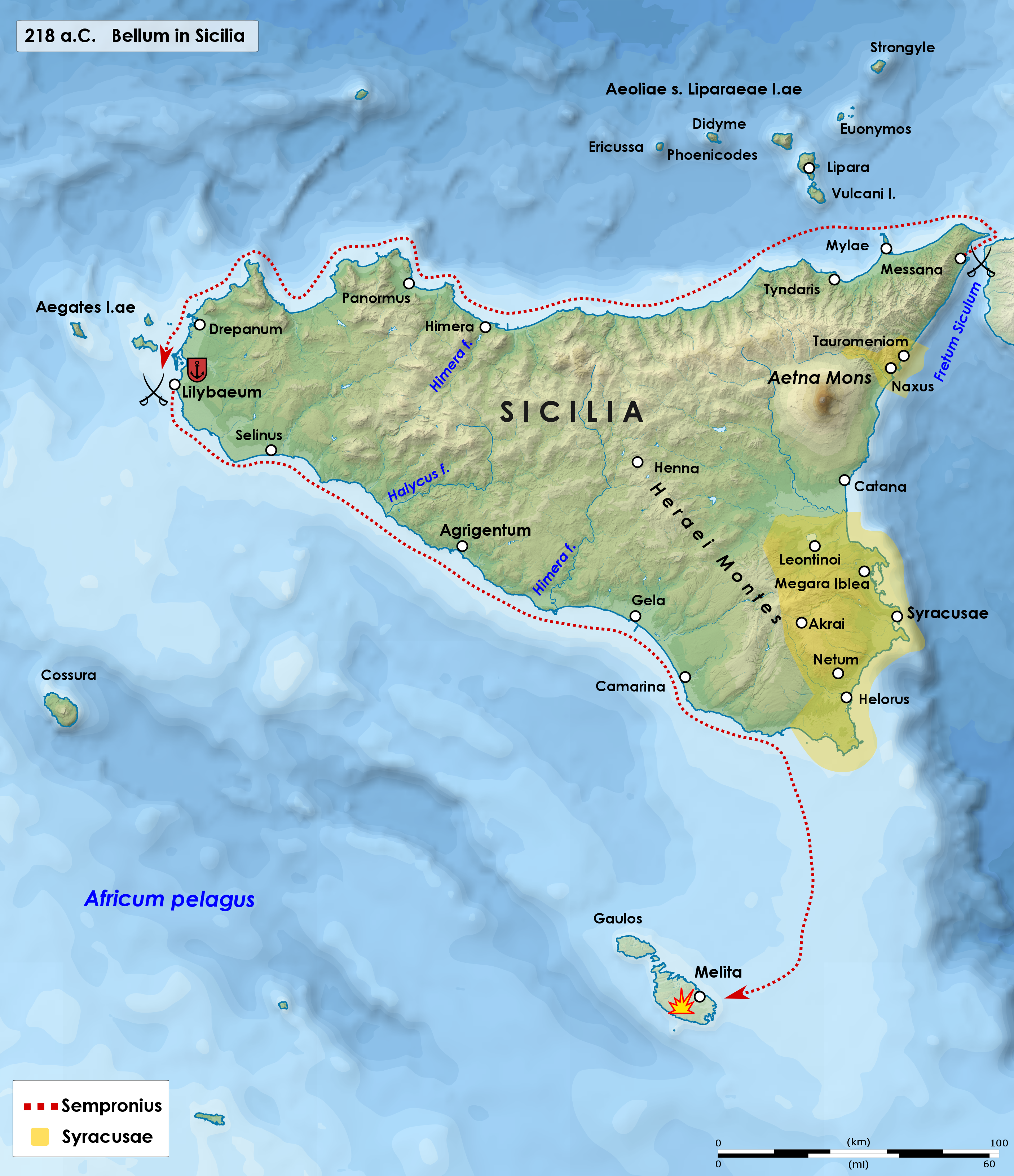 La Sicilia romana e i domini siracusani di Gerone nel 218 a.C.